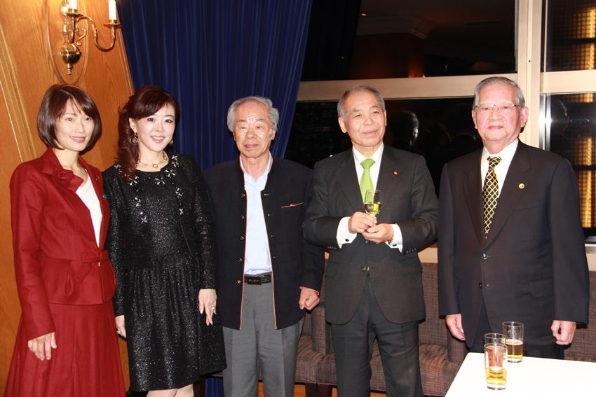 丸川珠代 佐野美和 西山由之 鈴木宗男 パーティでの様子